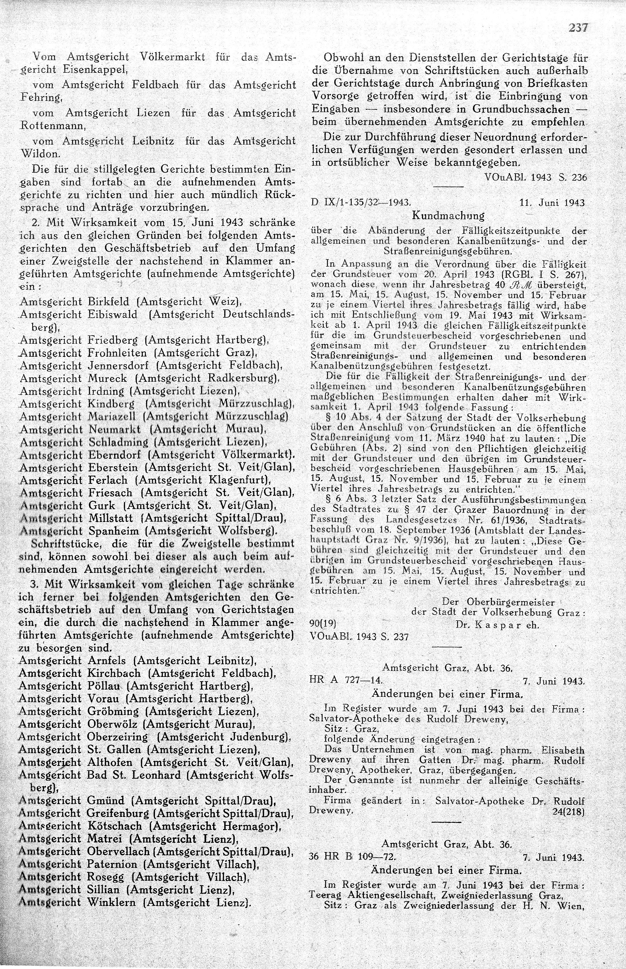 Verordnungs- und Amtsblatt für den Reichsgau Steiermark 1943, S. 236/237: Stillegung bzw. Einschränkung des Betriebes von Amtsgerichten (Bezirksgerichten) in der Steiermark und in Kärnten ab 15. Juni 1943. Siehe auch S. 236: File:Asoziale und Gerichtsorganisation Stmk 1943- 1.jpg